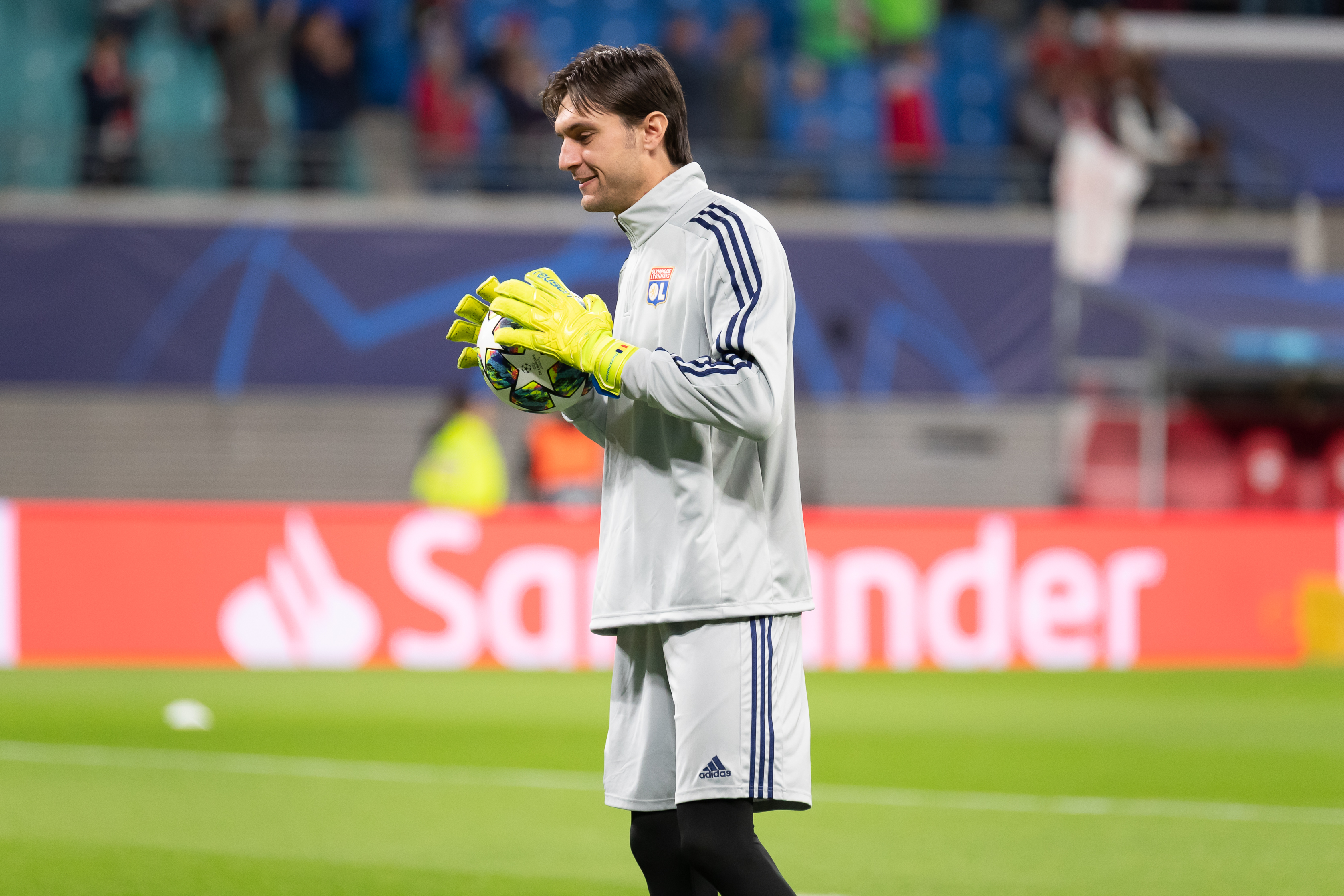 Fußball, Männer, UEFA Champions League, RB Leipzig - Olympique Lyonnais; Ciprian Tatarusanu (Olympique Lyonnais, 30, Torwart, goal keeper)